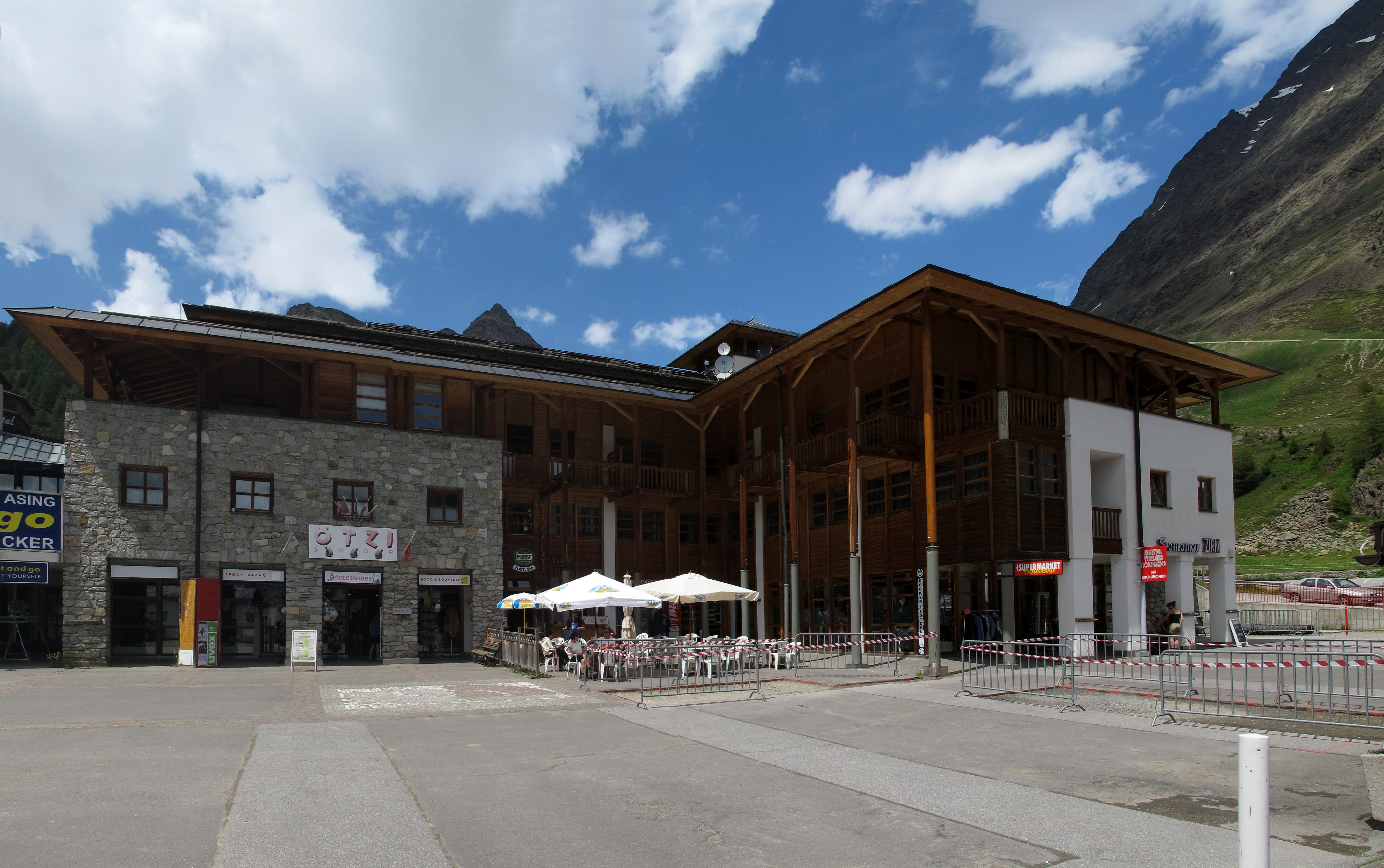 Kurzras im Schnalstal (Südtirol): Hauptplatz mit "Ötzi"-Supermarkt